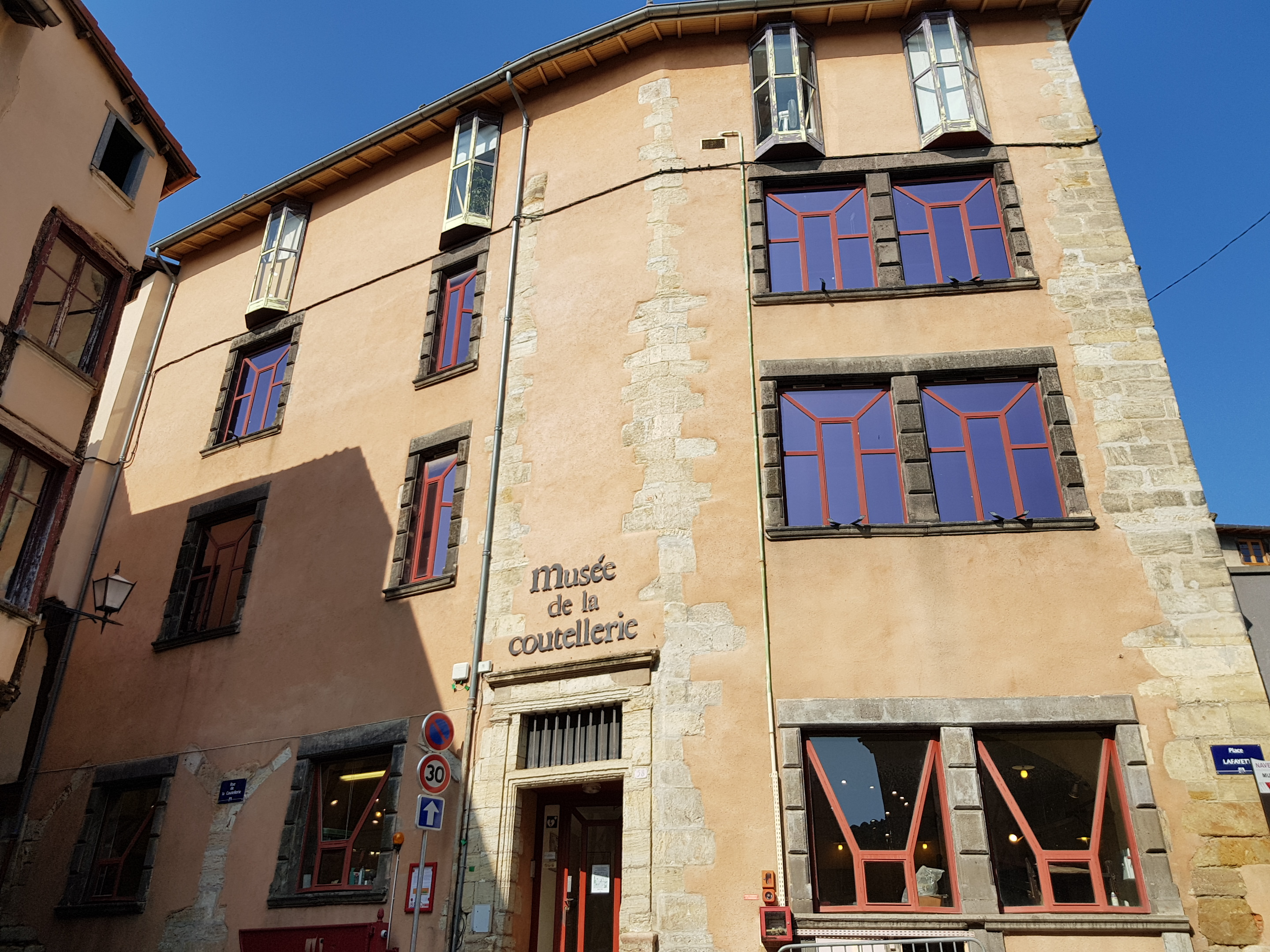 Maison des Consuls accueillant le Musée de la coutellerie à Thiers